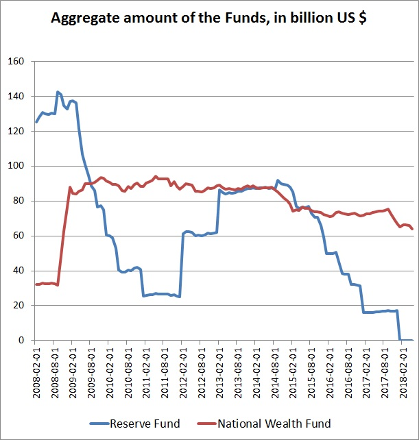 Valeur en USD des fonds russes au 1er mai 2018